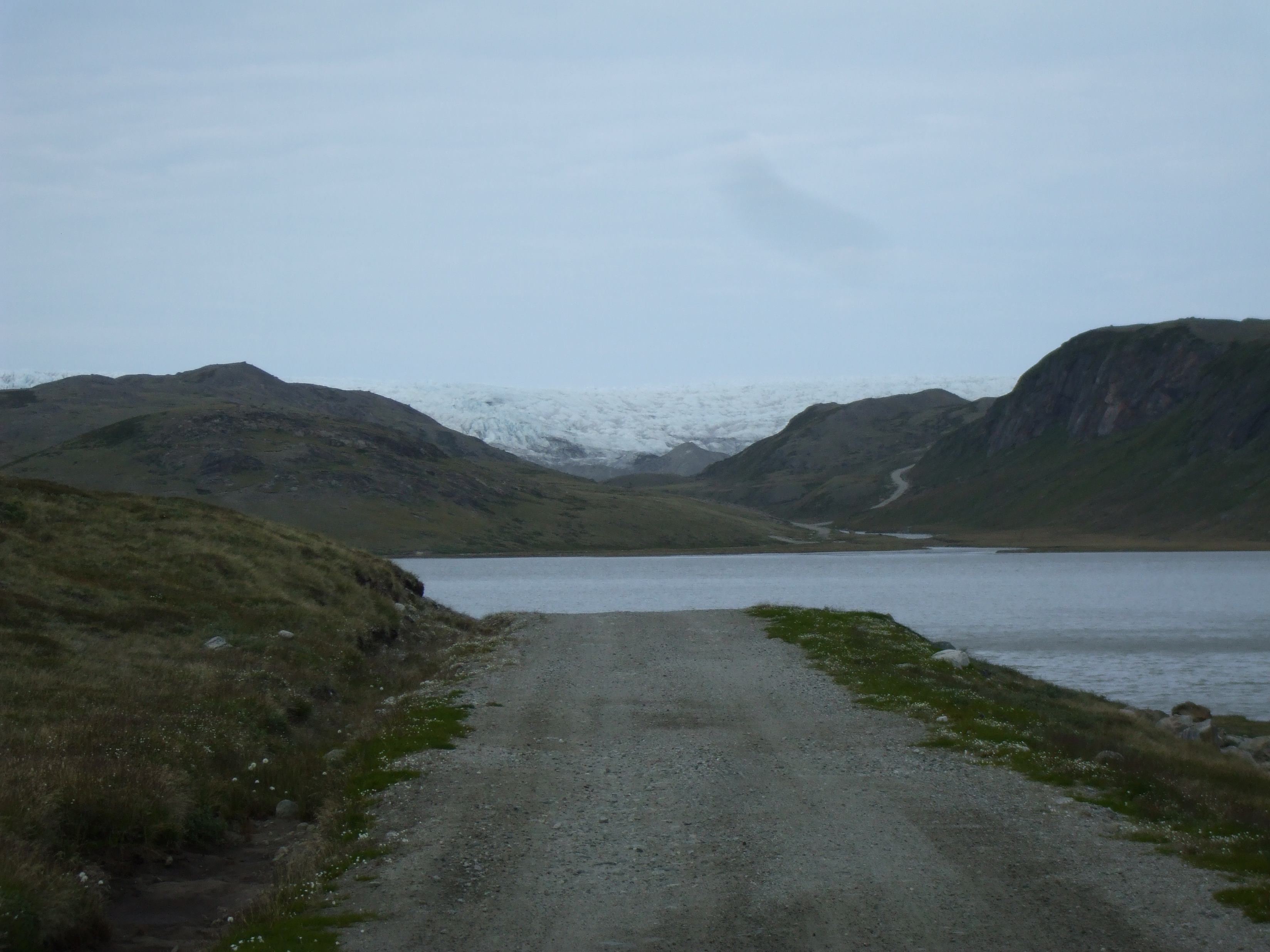 Route Inlandsis Kangerlussuaq Groenland 2009 Expédition ACarré